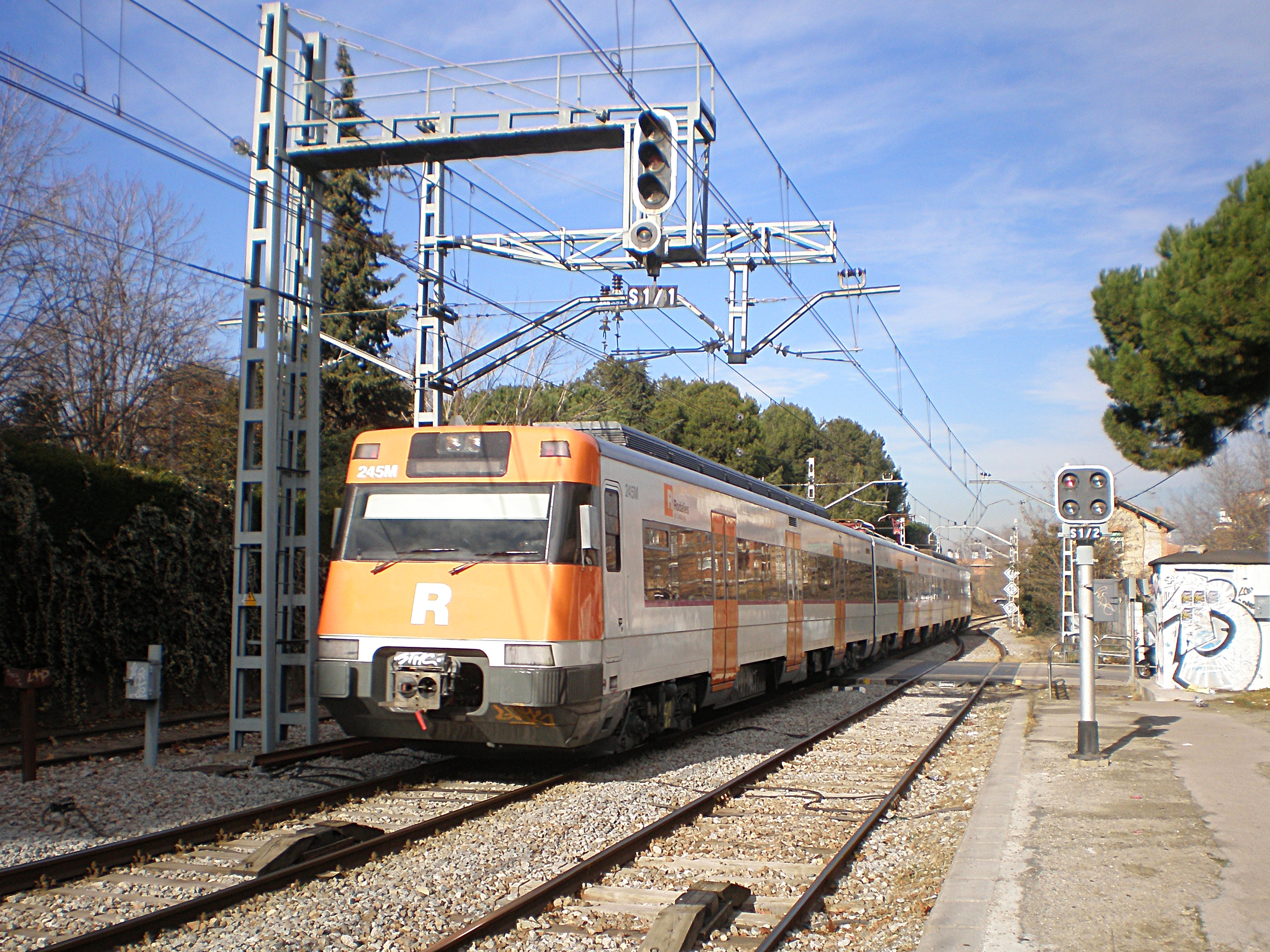 Una unidad eléctrica múltiple de la serie 447 de Renfe Operadora, que realiza un servicio R-3 de Rodalies de Catalunya a L'Hospitalet de Llobregat, entrando en la estación de Mollet Santa Rosa (Mollet del Vallès, comarca del Vallès Oriental, provincia de Barcelona, Catalunya) en la línea 222 de Adif de La Tour de Carol-Enveigt a Montcada Bifurcació.